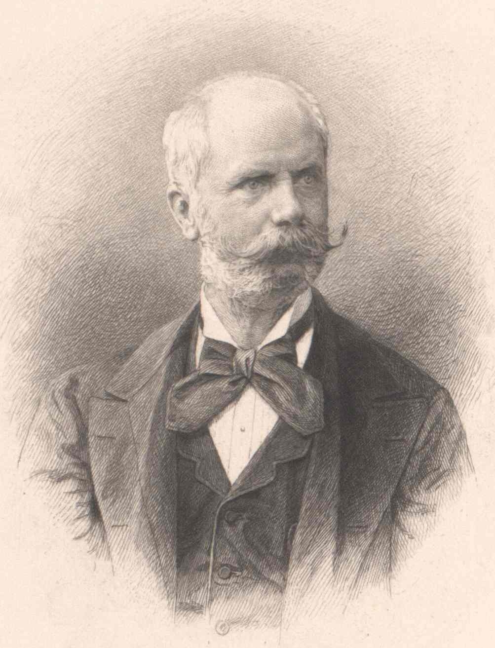 Porträt Quirin Ritter von Leitner (1834–1893), Vorstand des k.k. Hofwaffenmuseums (1869–1895, heute Heeresgeschichtliches Museum) in Wien